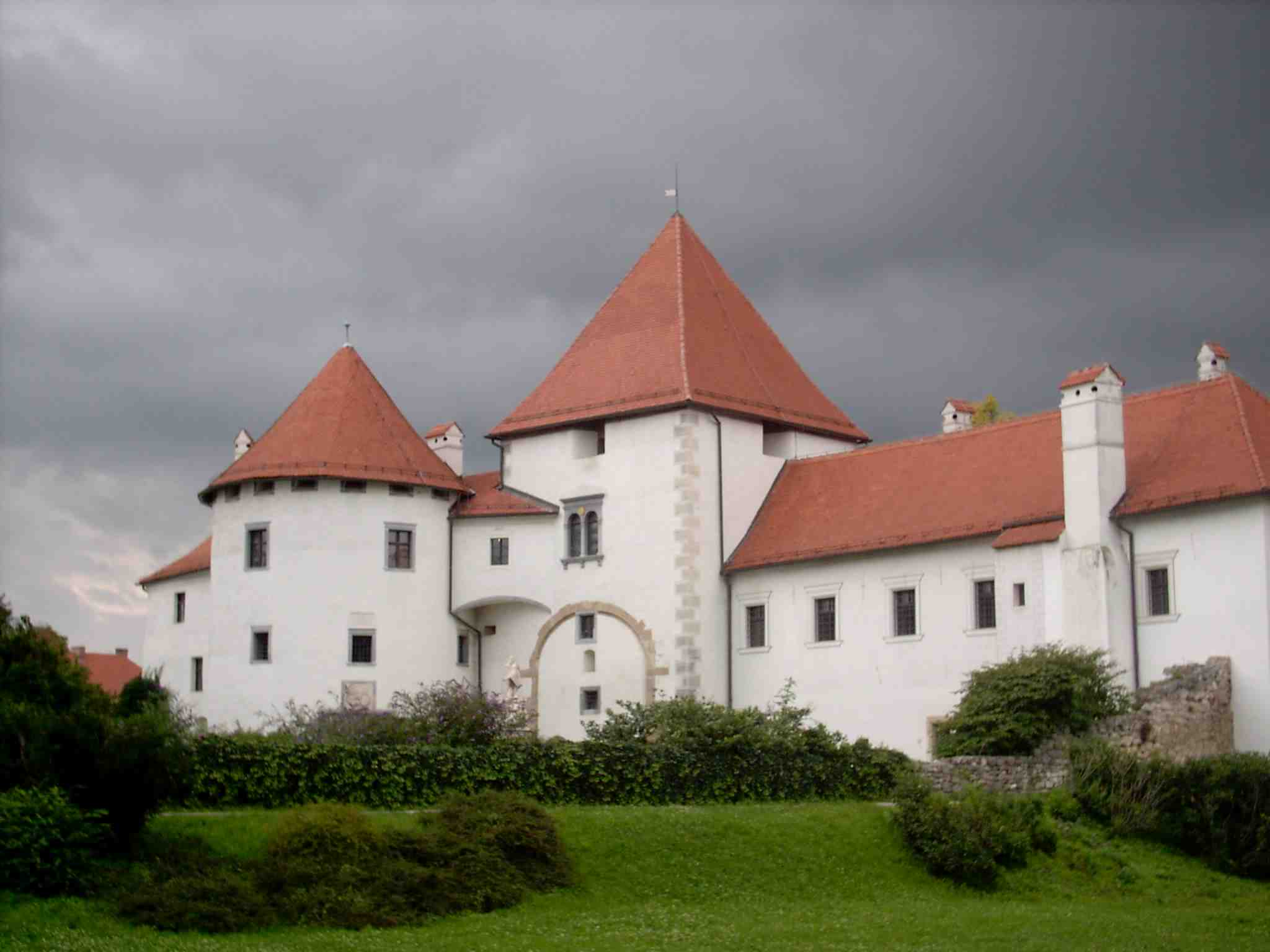 Varaždin Stari grad